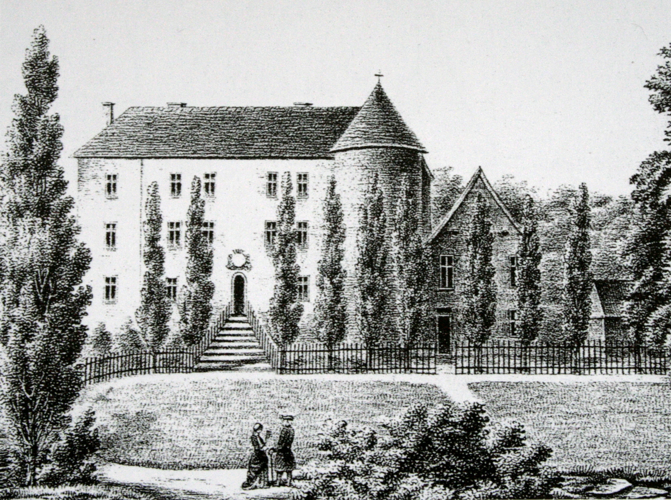 Altes Schloss Nustrow, Mecklenburg-Vorpommern, Deutschland, Zeichnung von 1825